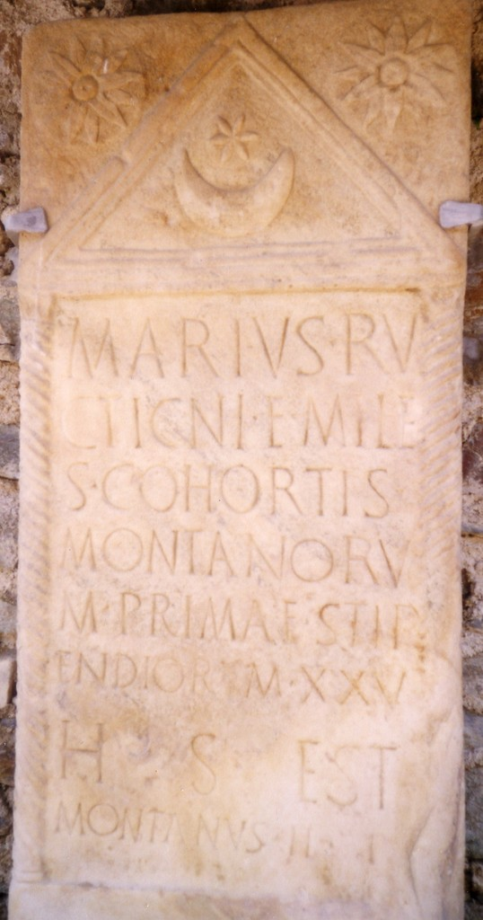 CIL III 4849